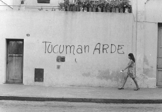 Fotografía tomada durante la segunda fase de la campaña publicitaria de Tucumán Arde: grafitis 1968, octubre Fotografía de uno de los grafitis de "Tucumán Arde" realizados en la ciudad de Rosario durante la segunda fase de la campaña publicitaria de la obra. Las pintadas eran acciones clandestinas para las cuales colaboraron agrupaciones estudiantiles de la universidad. Fotografía de Carlos Militello Fotografía Derecho de uso: Graciela Carnevale Lugar: Rosario, Argentina Palabras clave: Tucumán Arde Tucumán grafiti campaña publicitaria acción clandestina Colección: Tucumán Arde (1968)